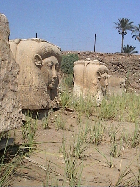 Chapiteaux hathoriques du temple d'Hathor à Memphis - XIXe dynastie égyptienne